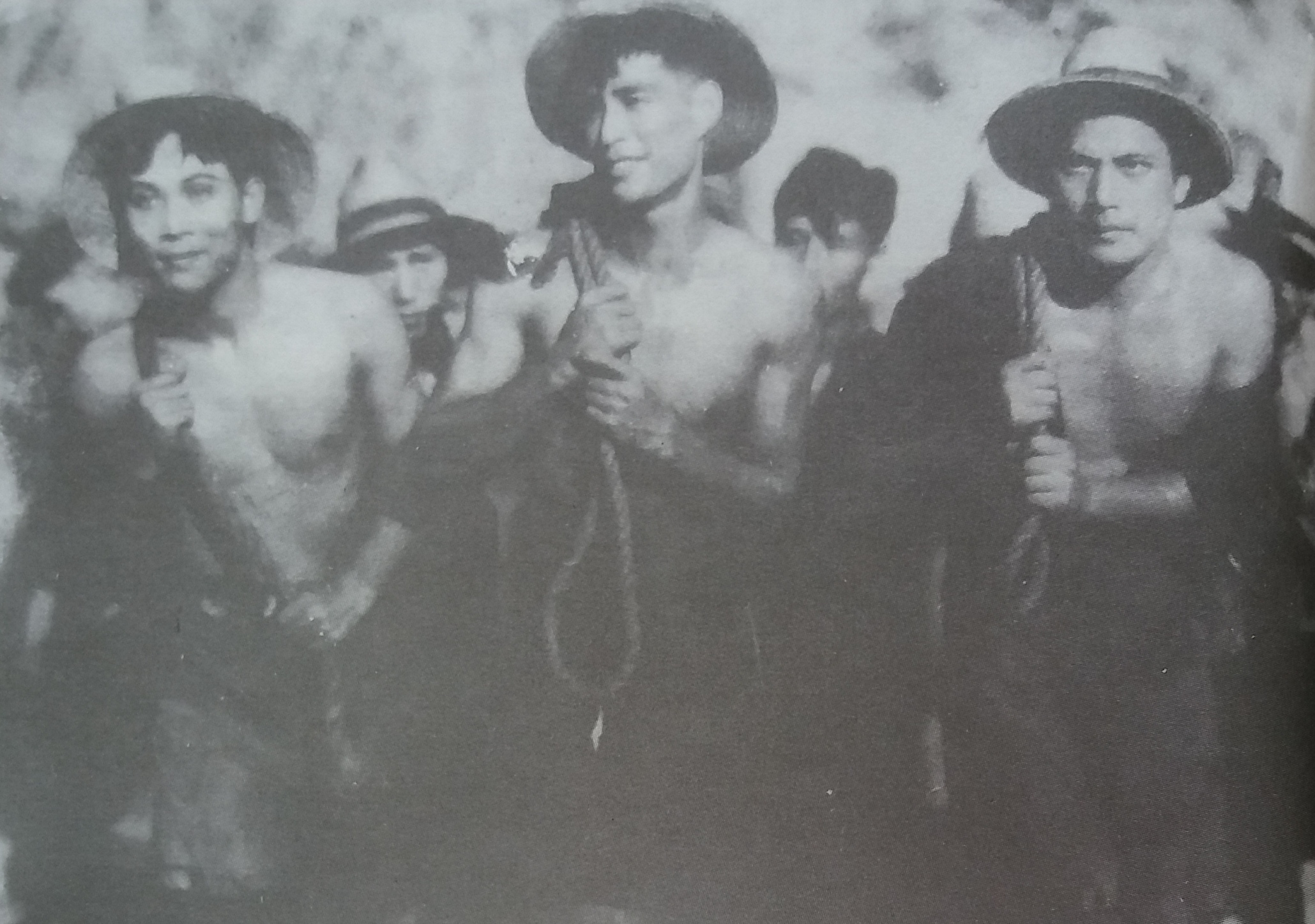 《大路》剧照